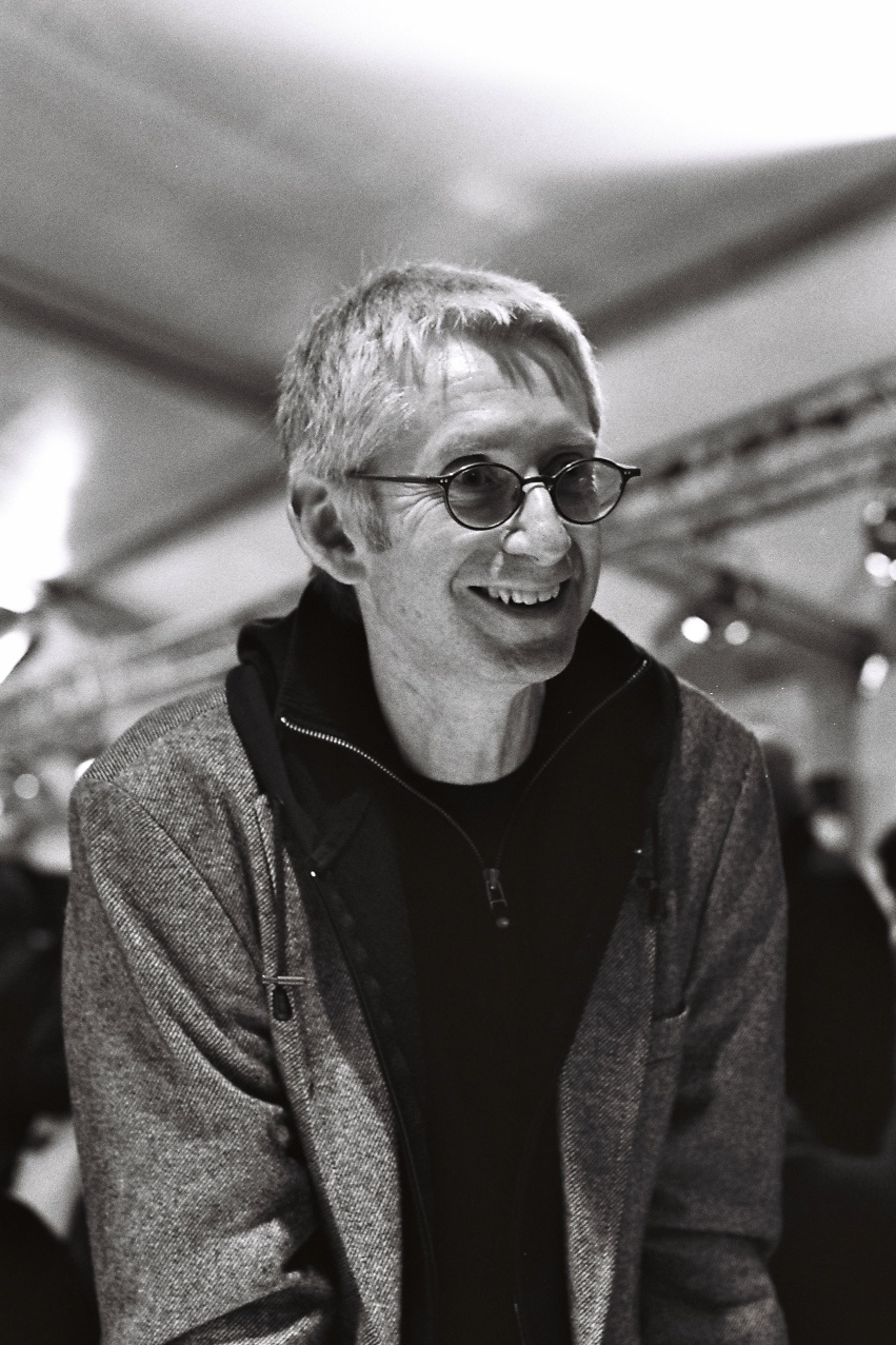 Patrick Pécherot au salon du livre Radio France, 26 novembre 2011